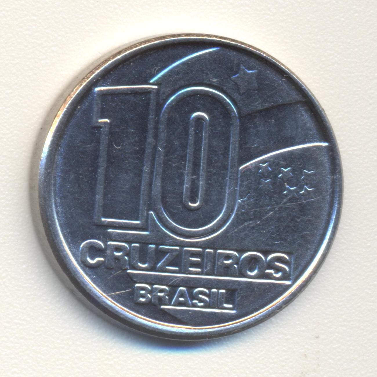 Moeda de 10 BRE (Cruzeiro) - Reverso